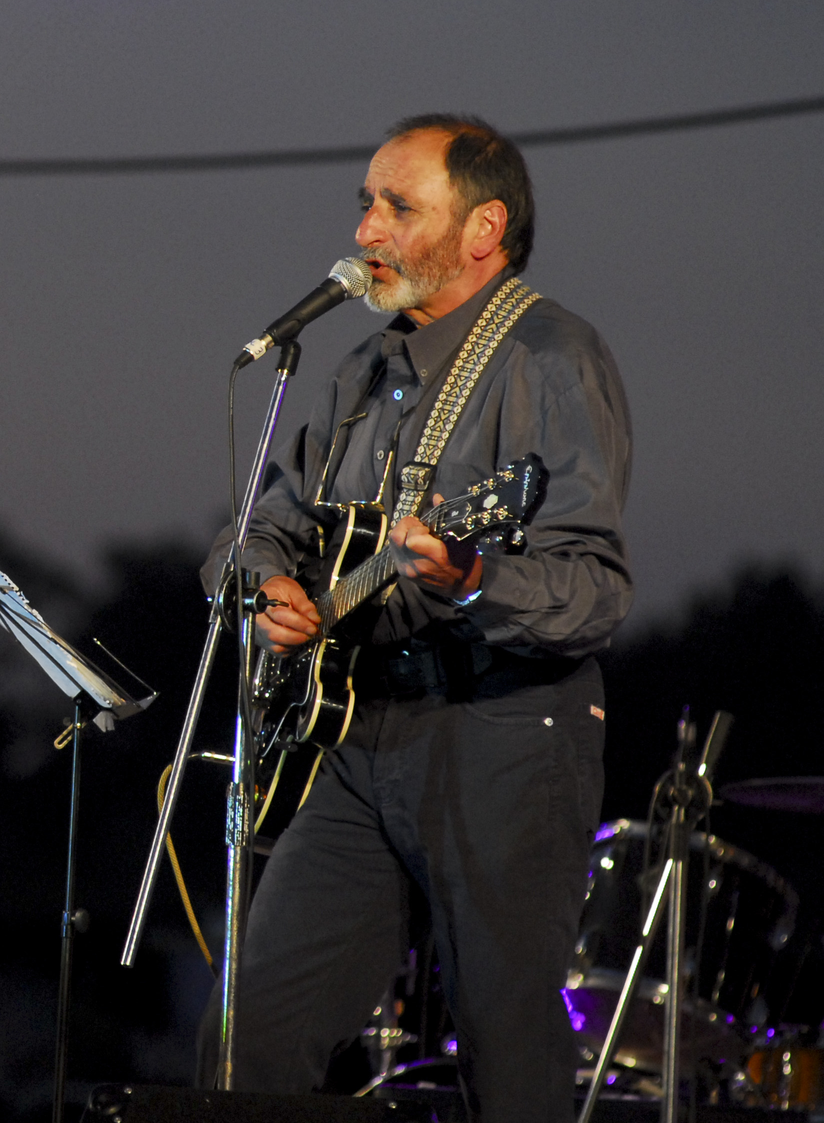 Gastón Ciarlo en 2011